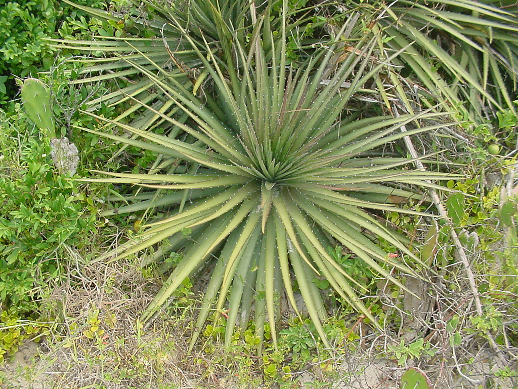 Dyckia maritima - BROMELIACEAE - Torres - RS - Brasil.